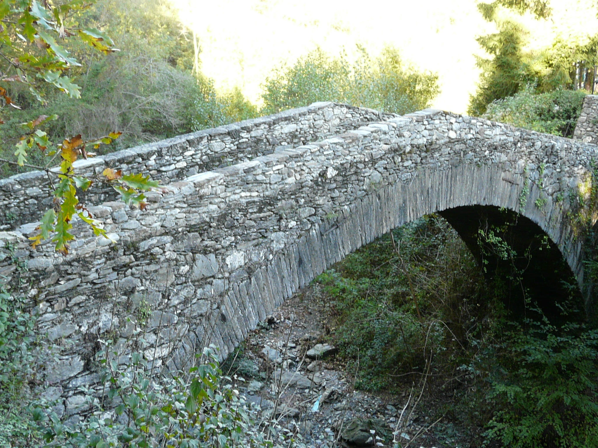 Ponte presso la frazione di Ognio, Neirone, Liguria, Italia